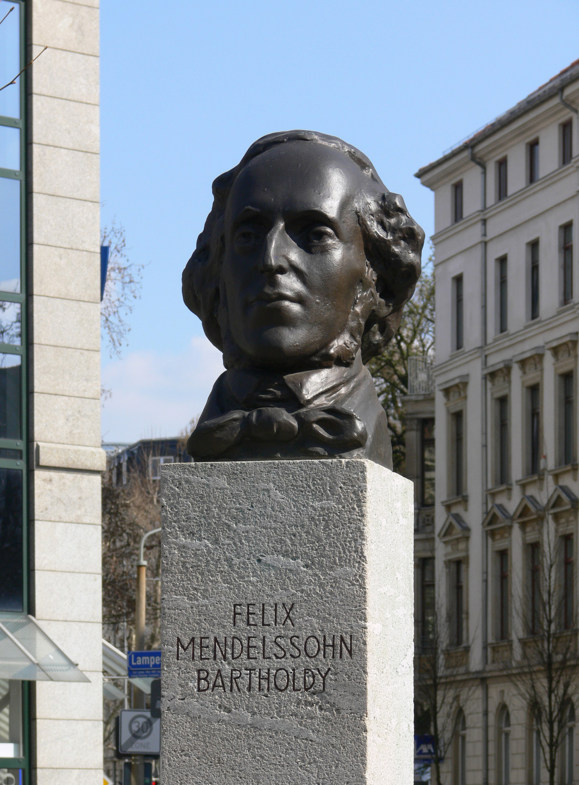 Leipzig, „2. Mendelssohn-Denkmal“ im Musikviertel, Porträtstele, Bildhauer Walter Arnold (1909-1979), enthüllt 1947 an der Vorderseite des beschädigten Gewandhauses, 1967 umgesetzt in die Fritz-von-Harck-Anlage, ab 2000 mit Beginn der Umgestaltung der Fritz-von Harck-Anlage im Mendelssohn-Haus, seit 2007 am neuen Mendelssohn-Ufer am freigelegten Pleißemühlgraben